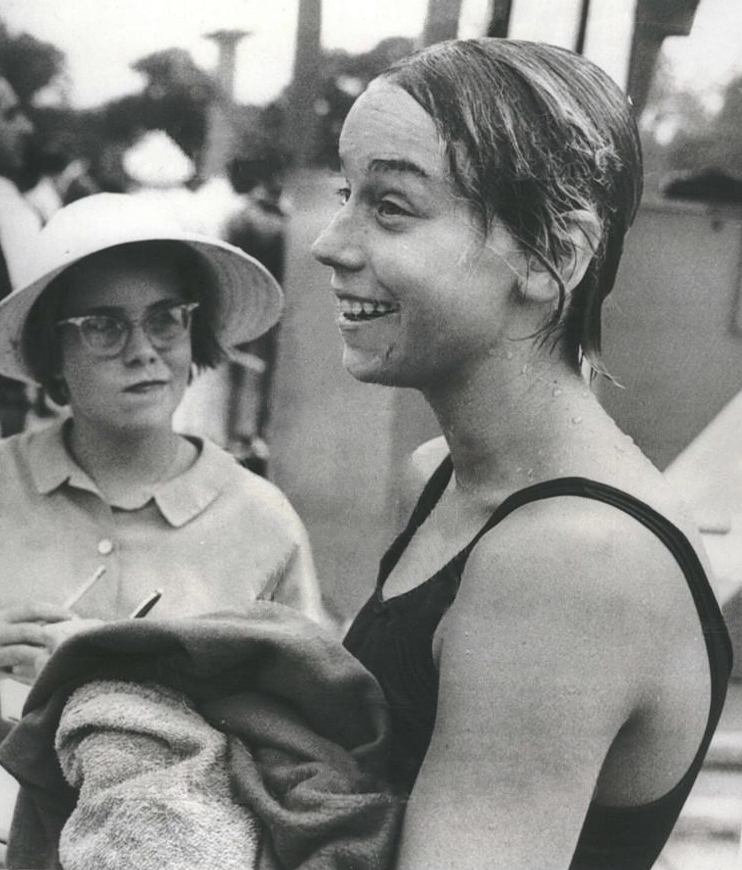 1961 PRESS PHOTO SUSAN DOERR, 15, SET NEW WORLD RECORD IN 100-METER BUTTERFLY